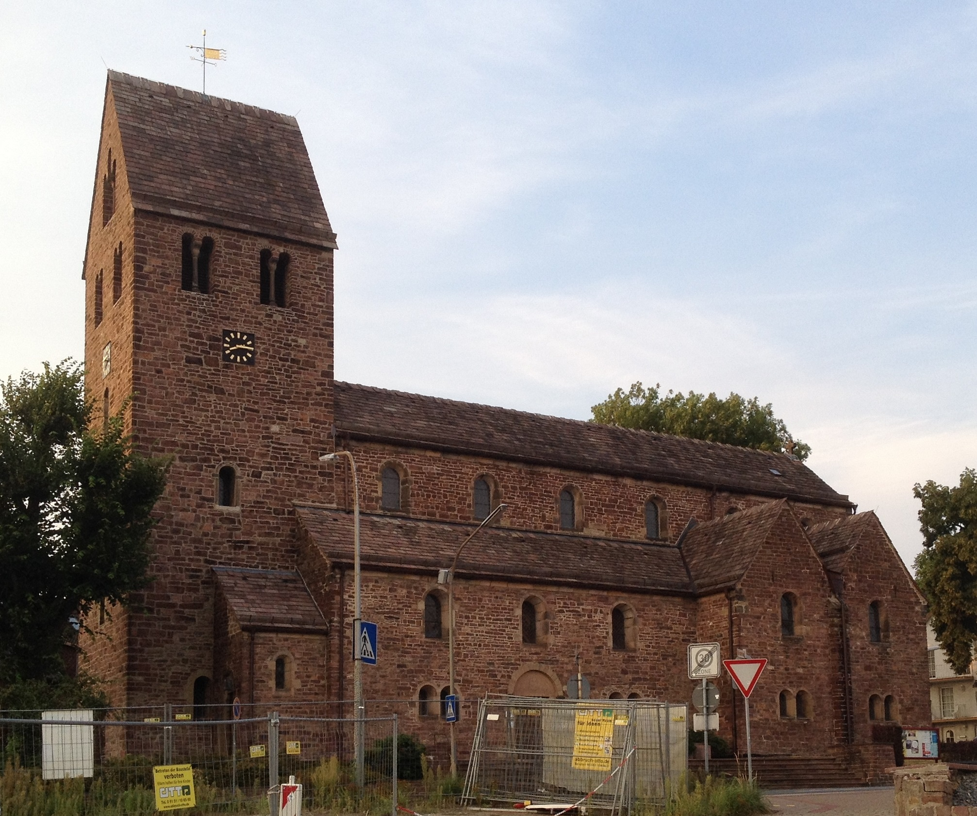 Bad Pyrmont, ev.-luth. Kirche St. Petri